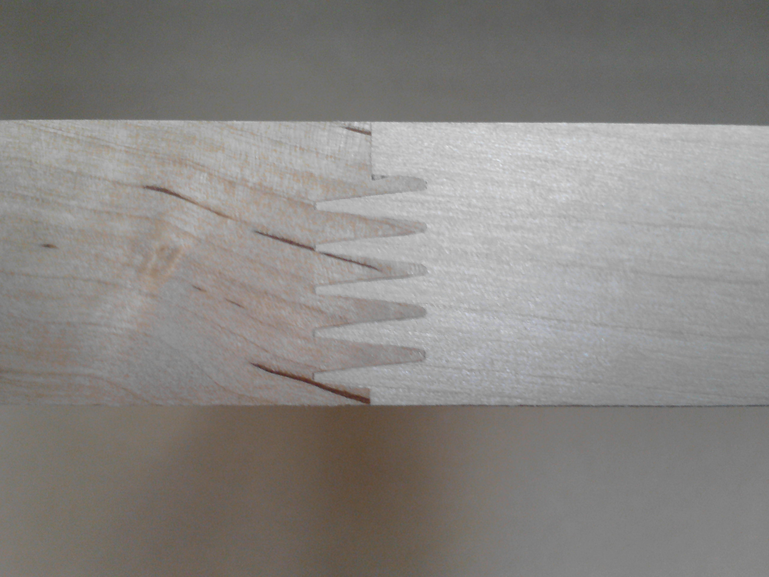 Połączenie elementów z drewna na mikrowczep